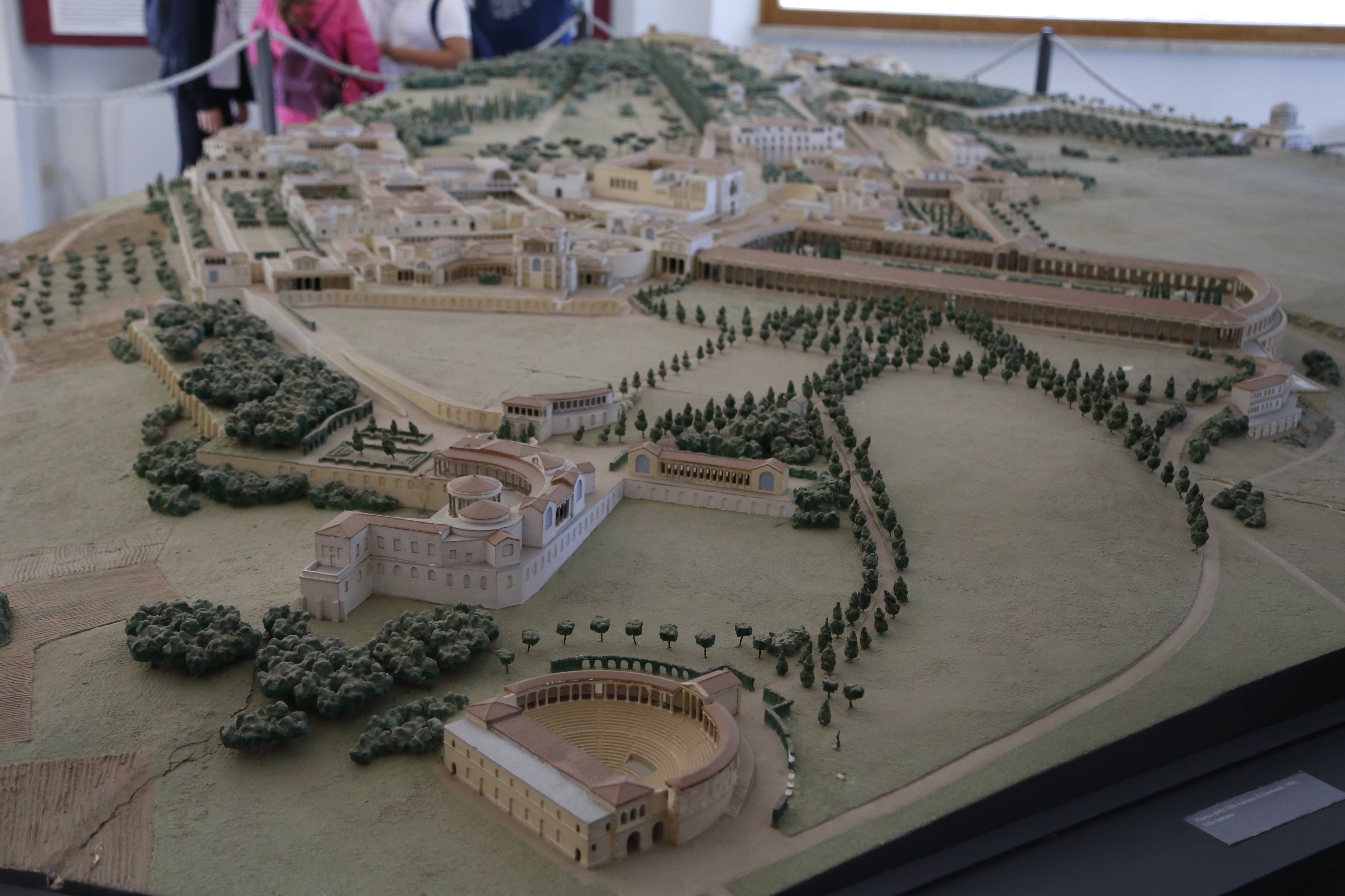 Villa Adriana